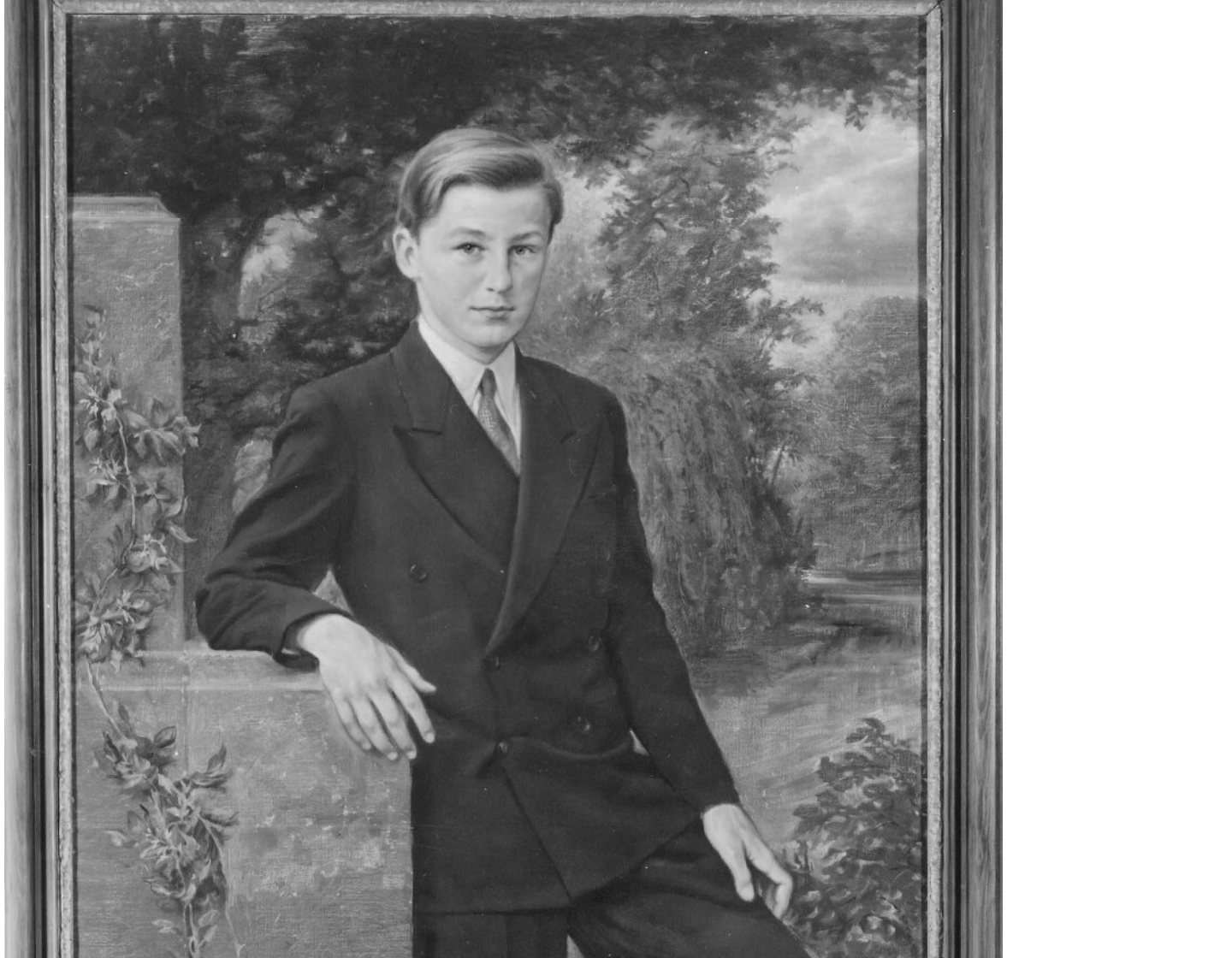 Olja på duk